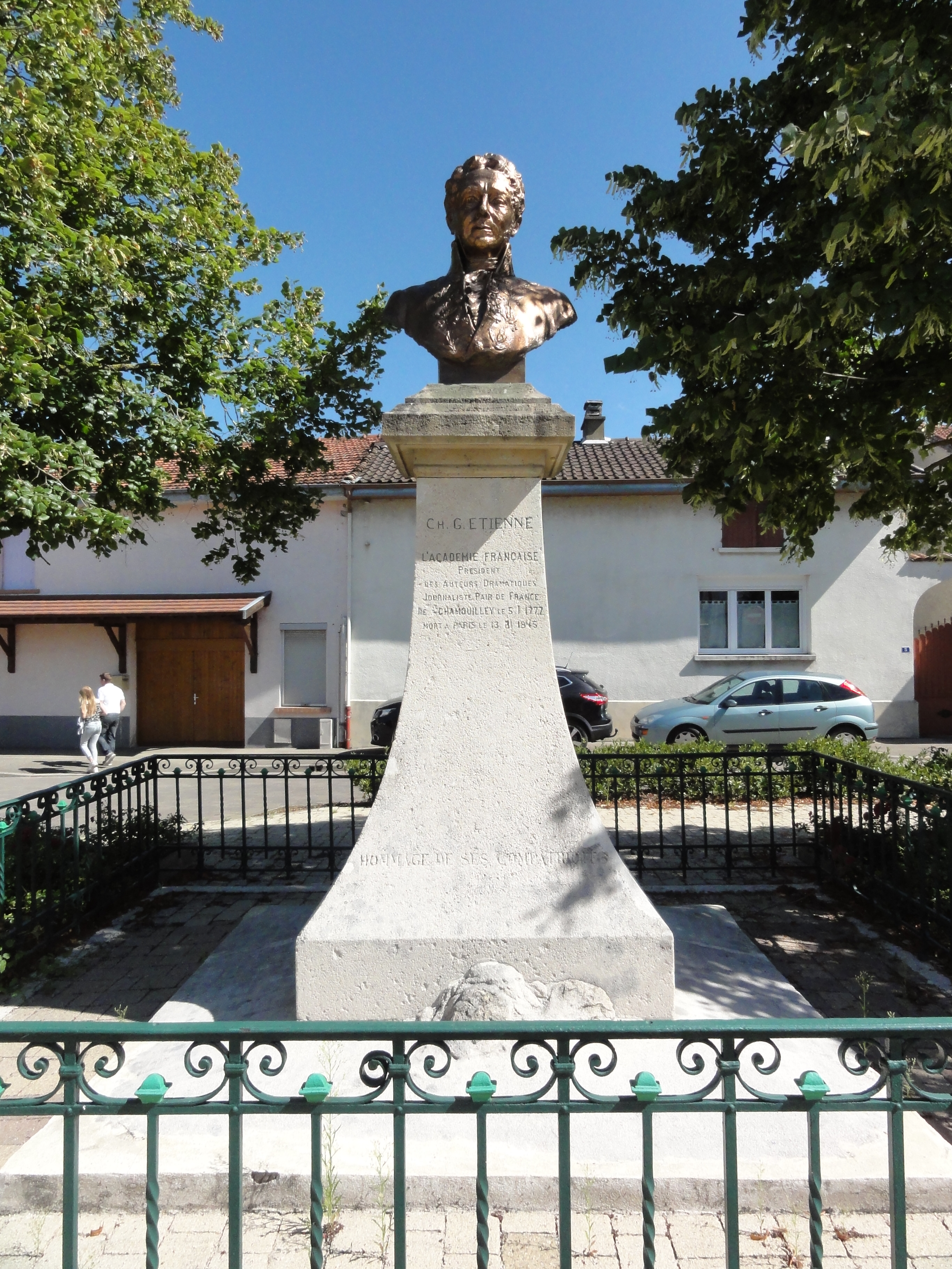 Chamouilley (Haute-Marne) buste Ch.G.Etienne